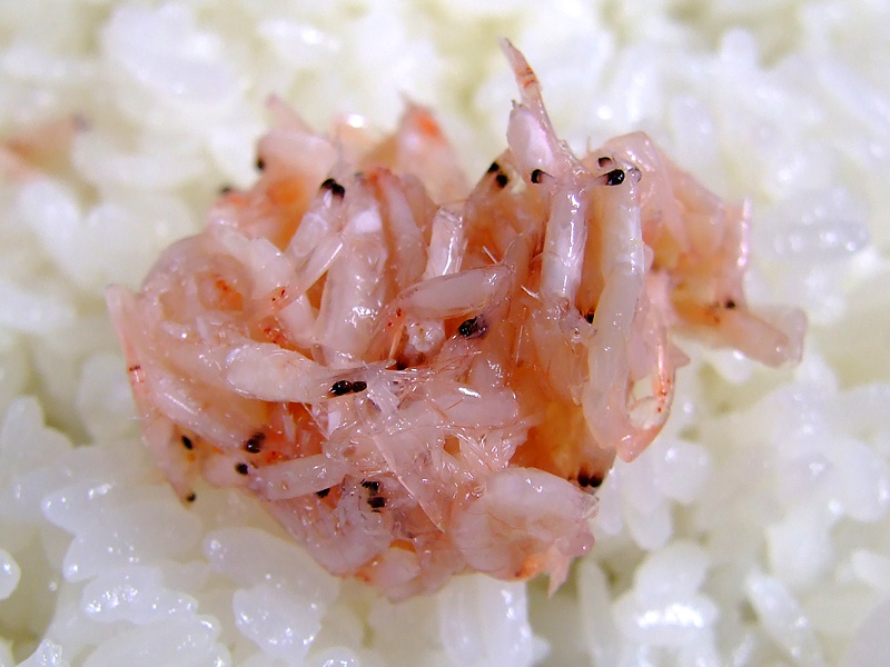 新潟で「赤ひげ」と呼ばれるアキアミを塩辛にしたもの。新米コシヒカリに乗せて。これだけで茶碗一杯のごはんが進む。